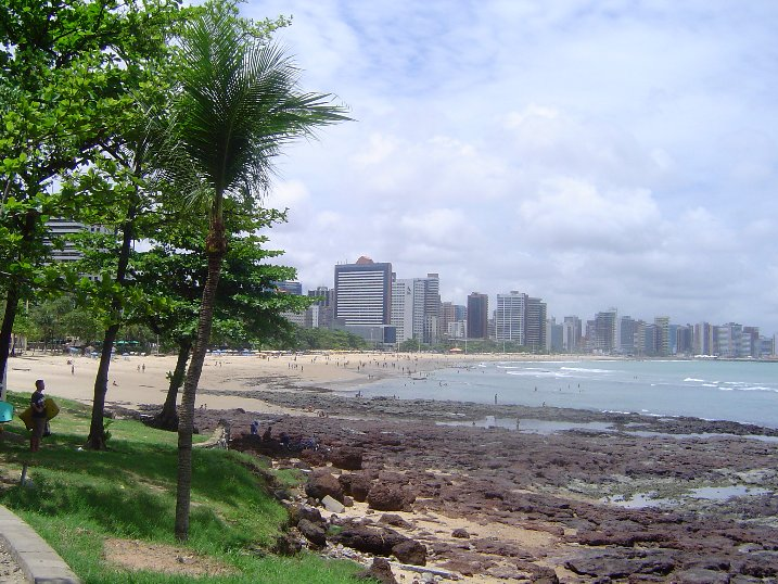 Litoral visto de uma praia de Fortaleza.